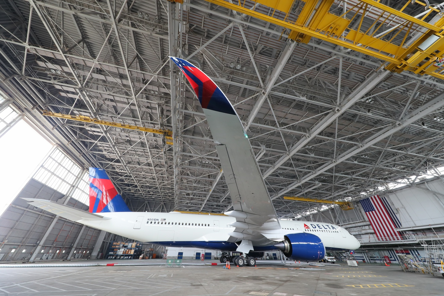 A350: Exterior